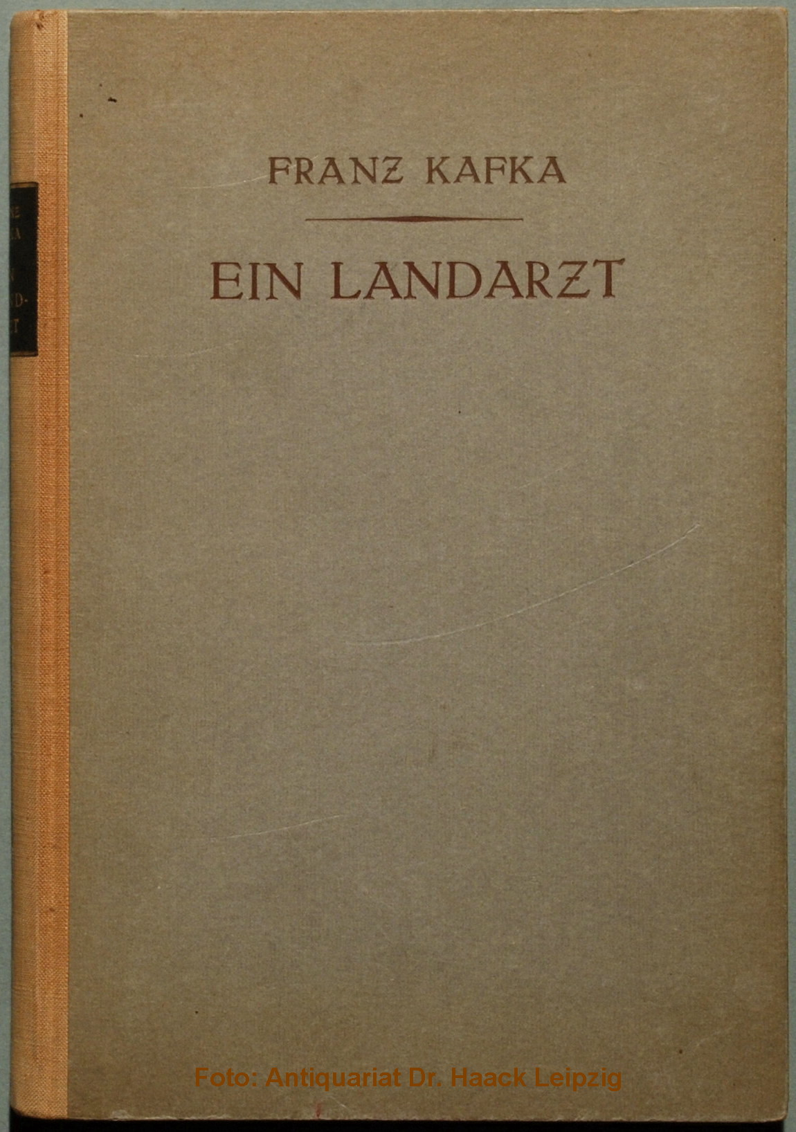 Kafka, Franz: Ein Landarzt. [14] Kleine Erzählungen. München und Leipzig: K. Wolff 1919, 4 nicht paginierte Blatt + 189 Seiten + 1 Blatt Inhalt verso Druckvermerk. Erstausgabe (Dietz 53; Raabe 6, Wilpert/Gühring² 6). Original-Halbleinen mit Rückenschild.